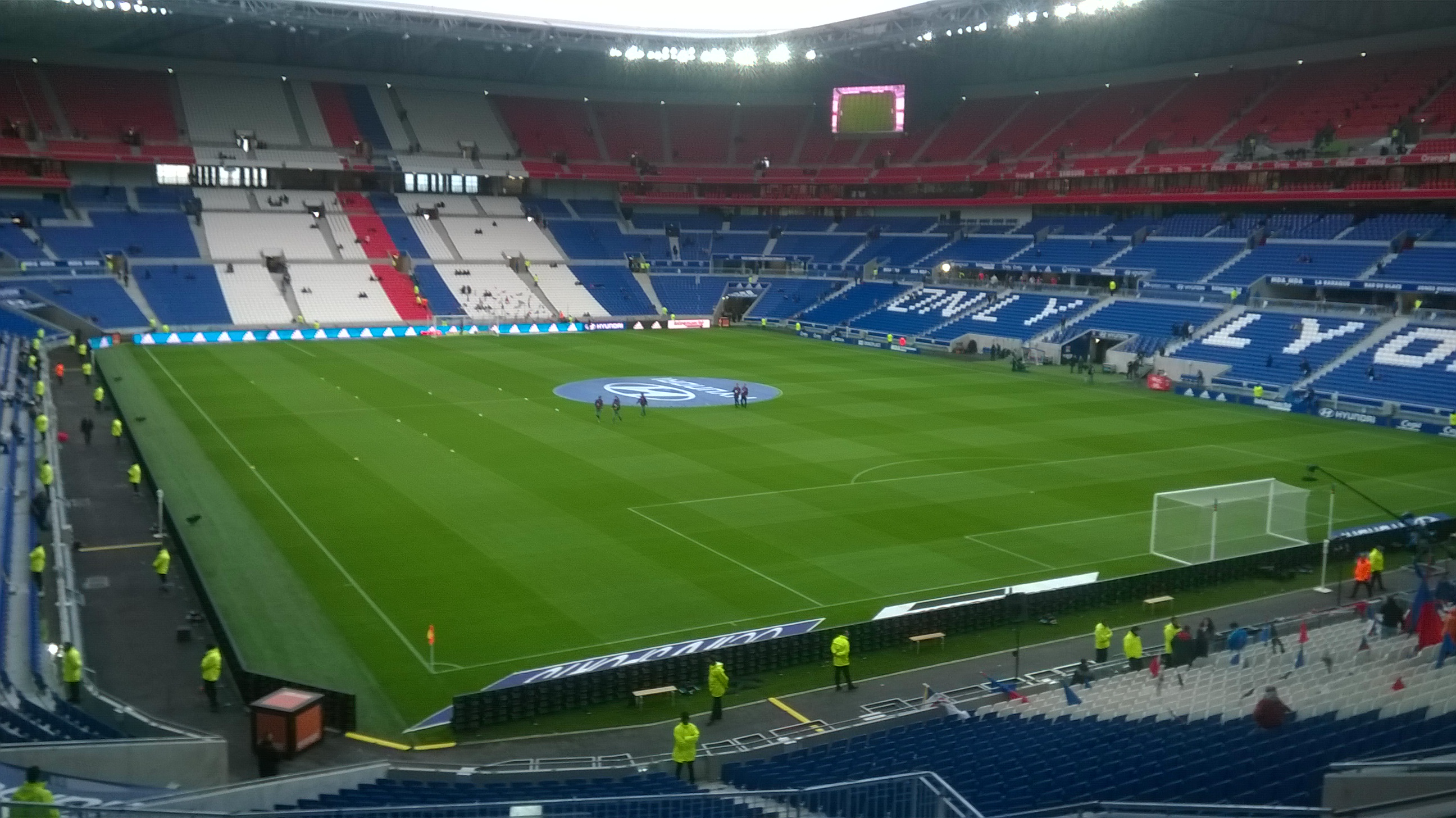 Le Parc Olympique Lyonnais avant Lyon - GFC Ajaccio